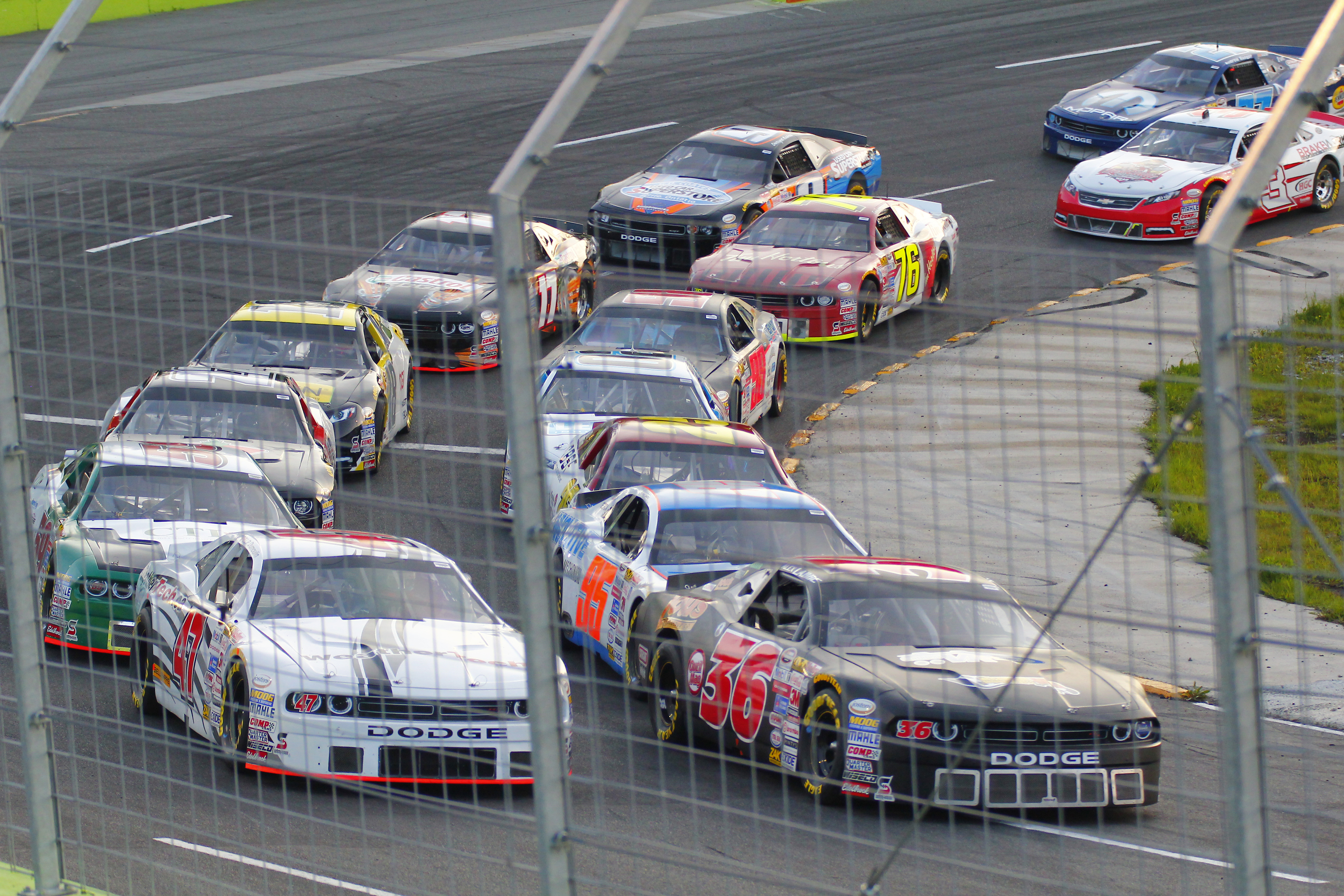 Autodrome Chaudière - 13 juin 2015 (Photo Paul-Émile Poulin-Jacques)